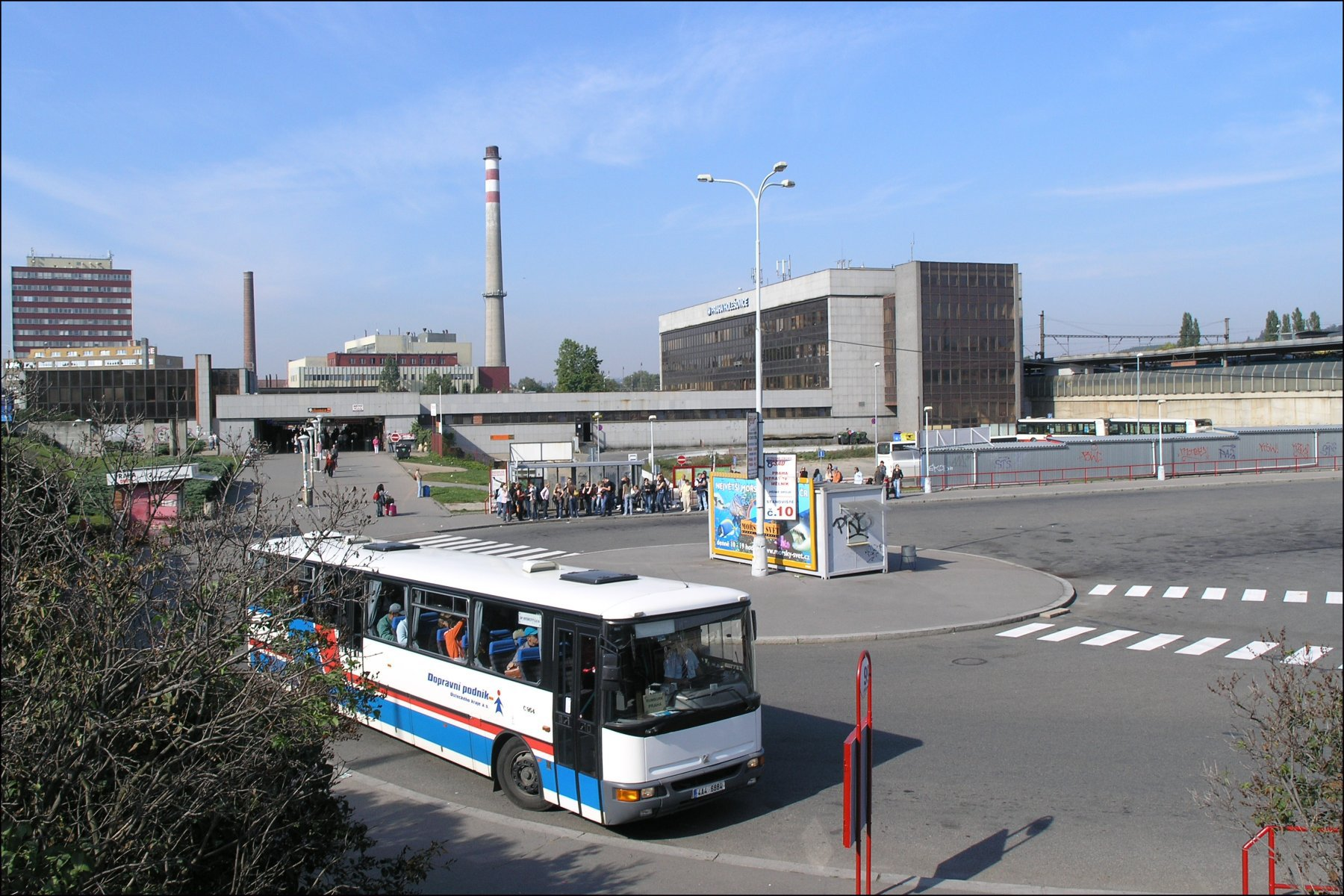 Autobusové nádraží Praha, Holešovice; autobus dopravce Dopravní podnik Ústeckého kraje